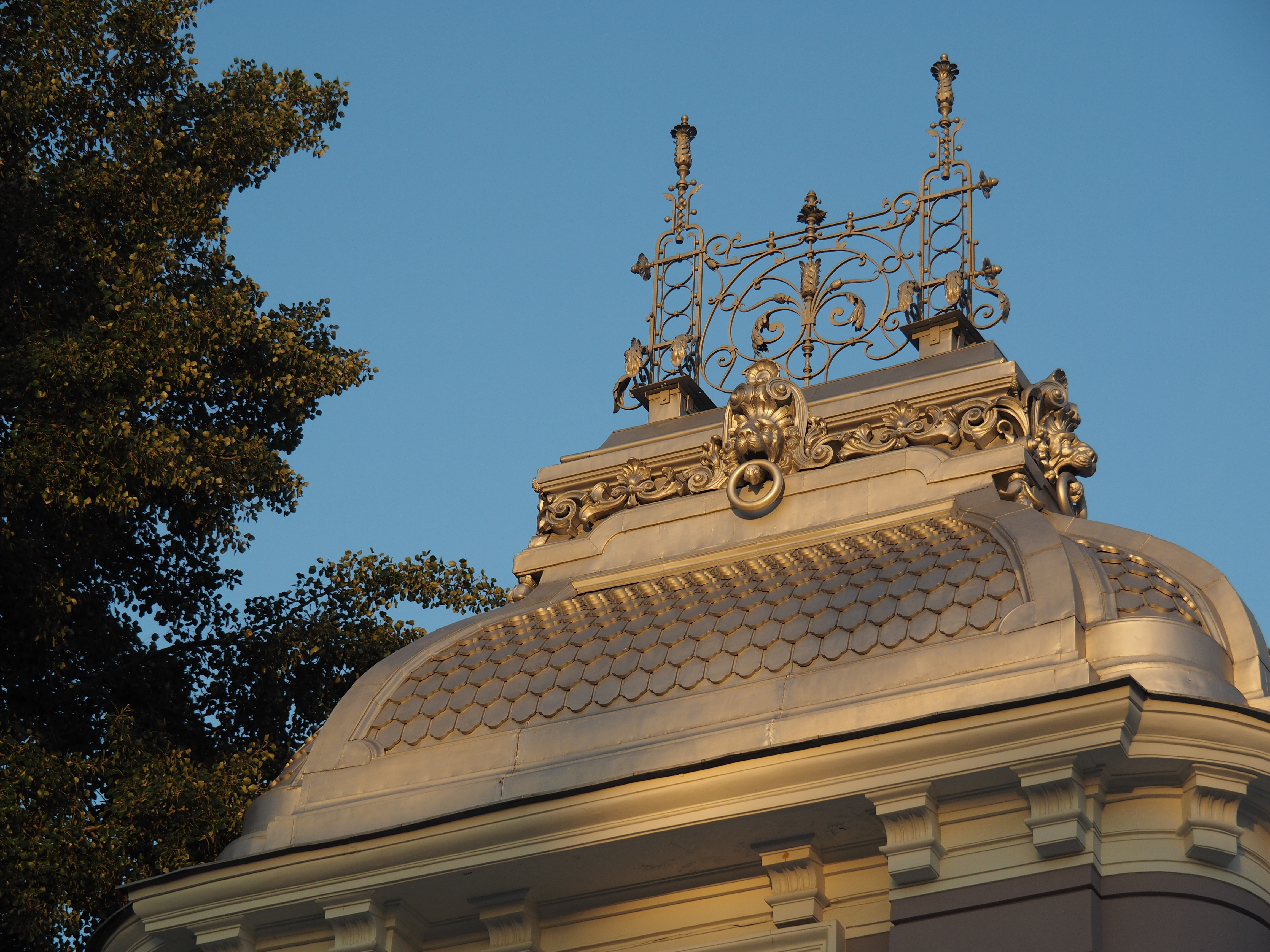 Особняк О.П. Коробковой со служебным флигелем и оградой: Пятницкая ул., дом 33-35, строение 3, Замоскворечье, Центральный округ, Москва